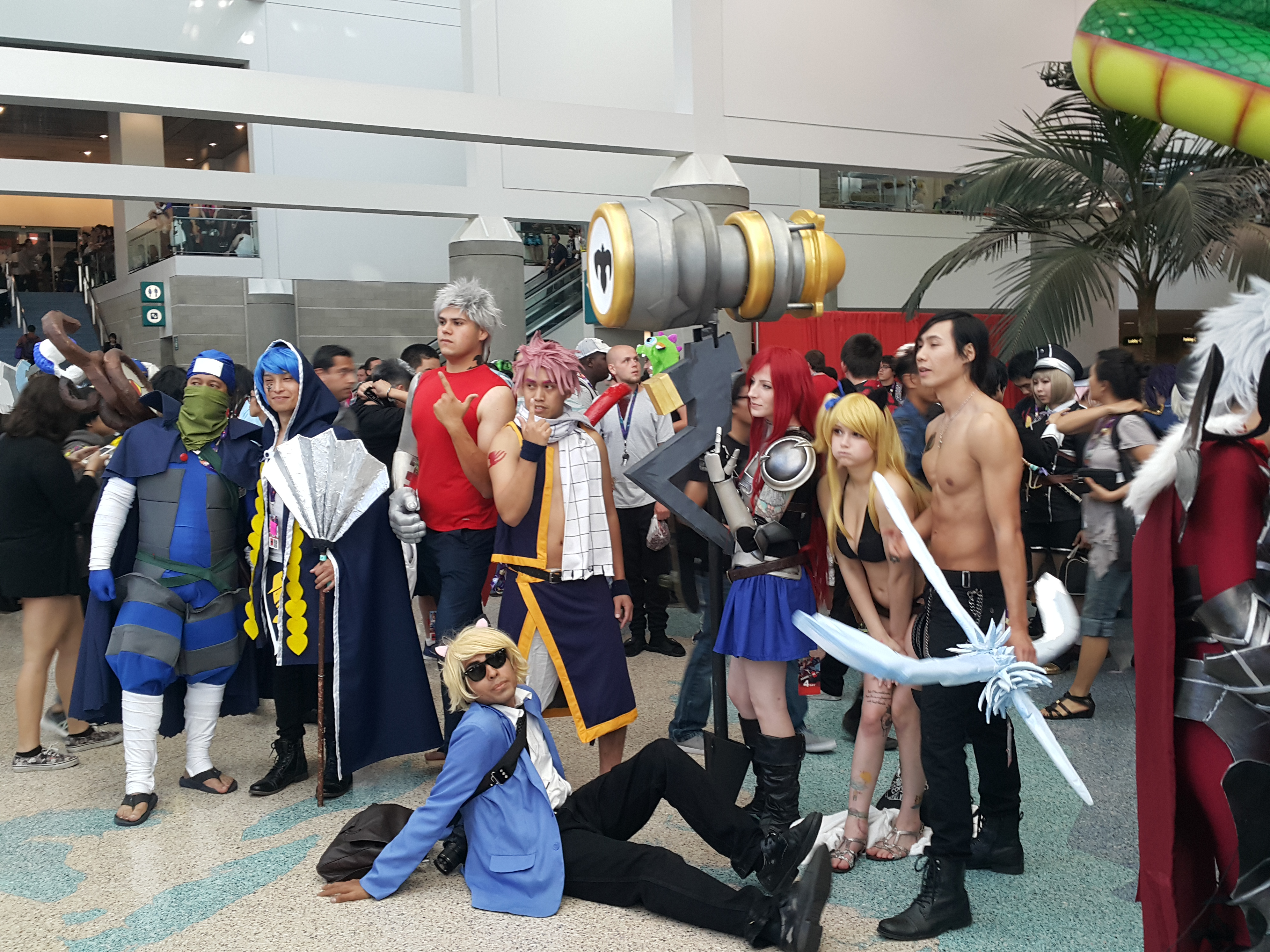 Cosplay at Anime Expo 2015.